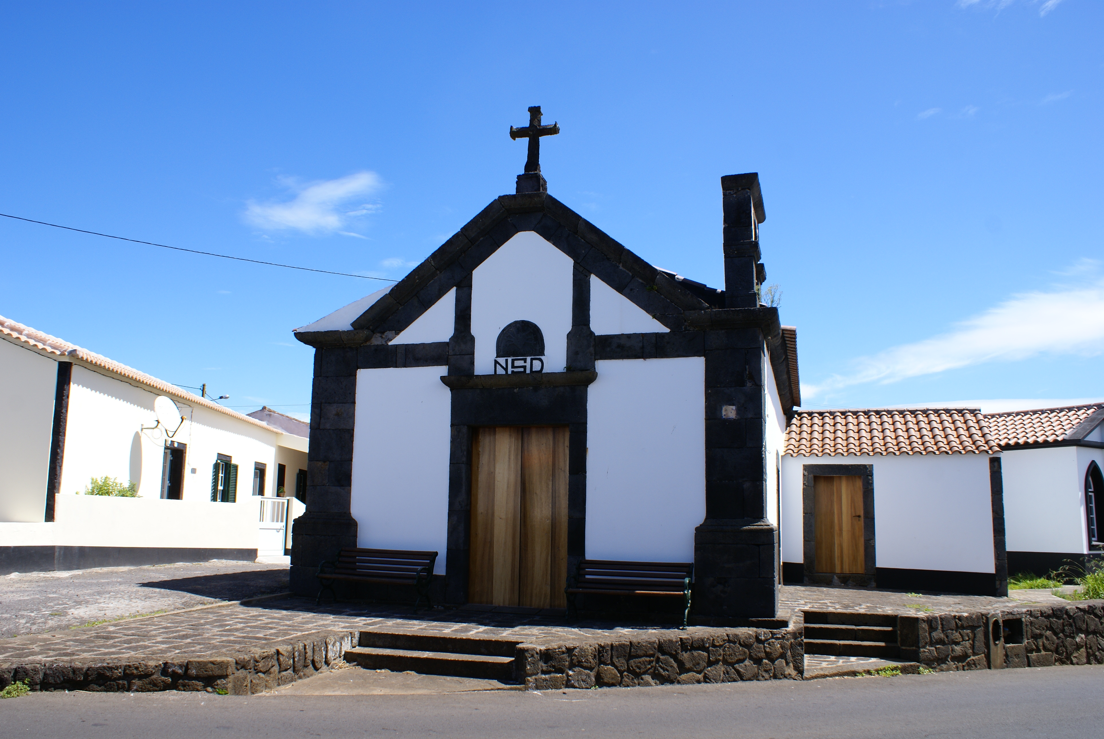 Ermida de Nossa Senhora das Dores, fachada, Dores, Santa Cruz da Graciosa, ilha Graciosa, Açores, Portugal